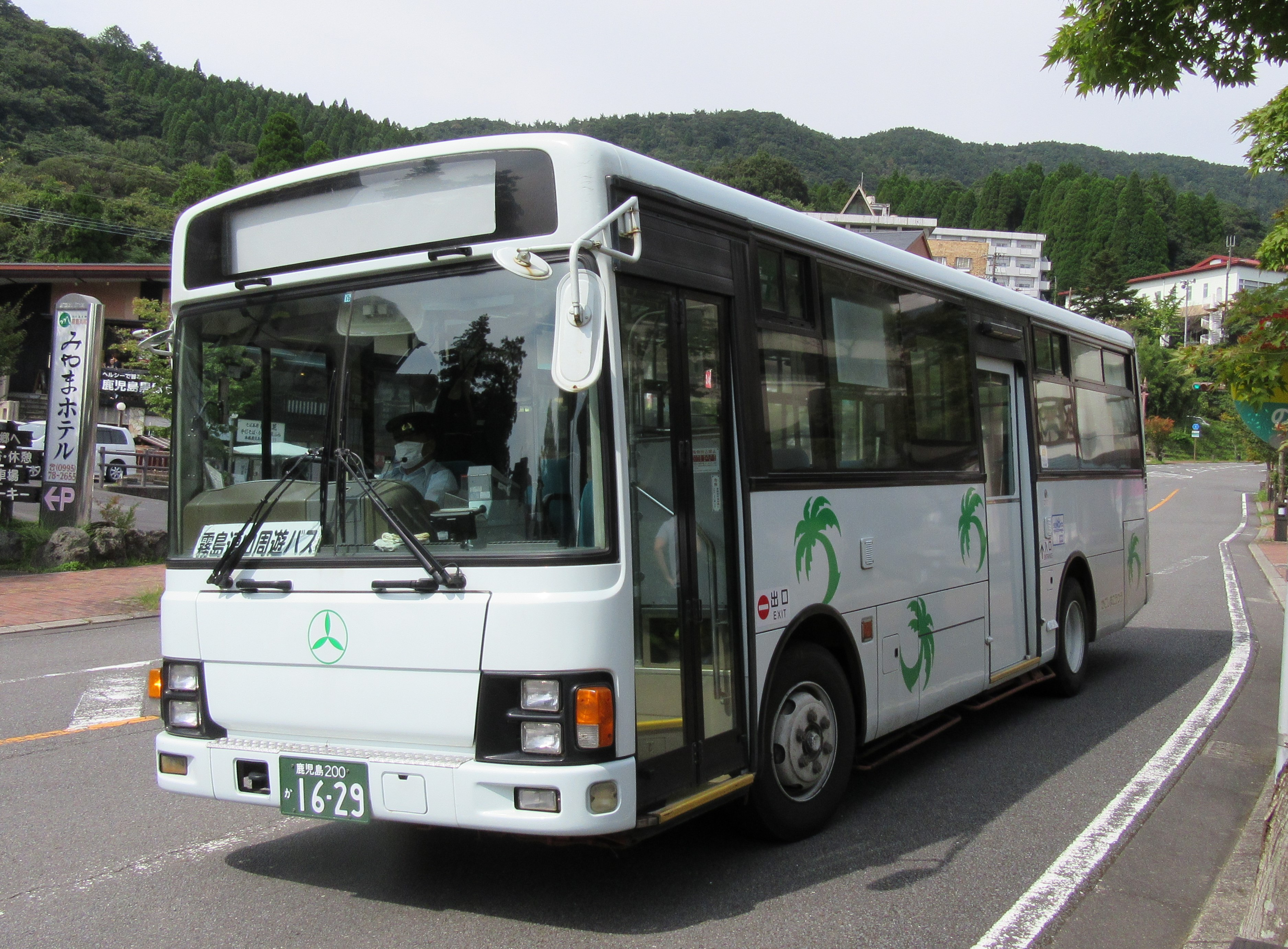 エルガミオ